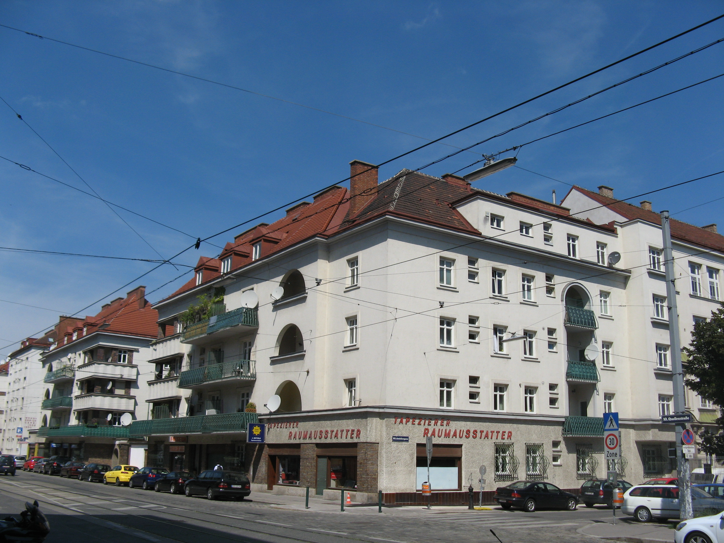 Wohnhausanlage (1928-29) von Max Hans Joli, Quellenstraße 24A, Wien-Favoriten